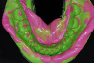 Etapa 5